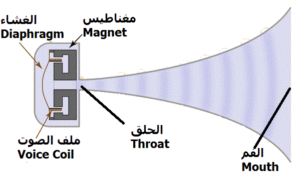 تتكون سماعة الهورن من الجزء الأساسي المنتج للصوت و يسمى Compression driver، و الذي يكون عبارة عن مغناطيس دائري قوي يوجد به فتحة صغيرة يتحرك داخل هذه الفتحة الملف الصوتي (الذي تمر به الإشارة الصوتية الآتية من المكبر)، الملف الصوتي متصل بغشاء (معدني أو خليط خاص) هذا الغشاء يسمى الديافرام الذي عند اهتزازه ينتج الصوت، الصوت الصادر يدخل إلى (حلق Throat) الهورن و ينتشر الصوت من خلال الفم (Mouth) إلى المحيط الخارجي.